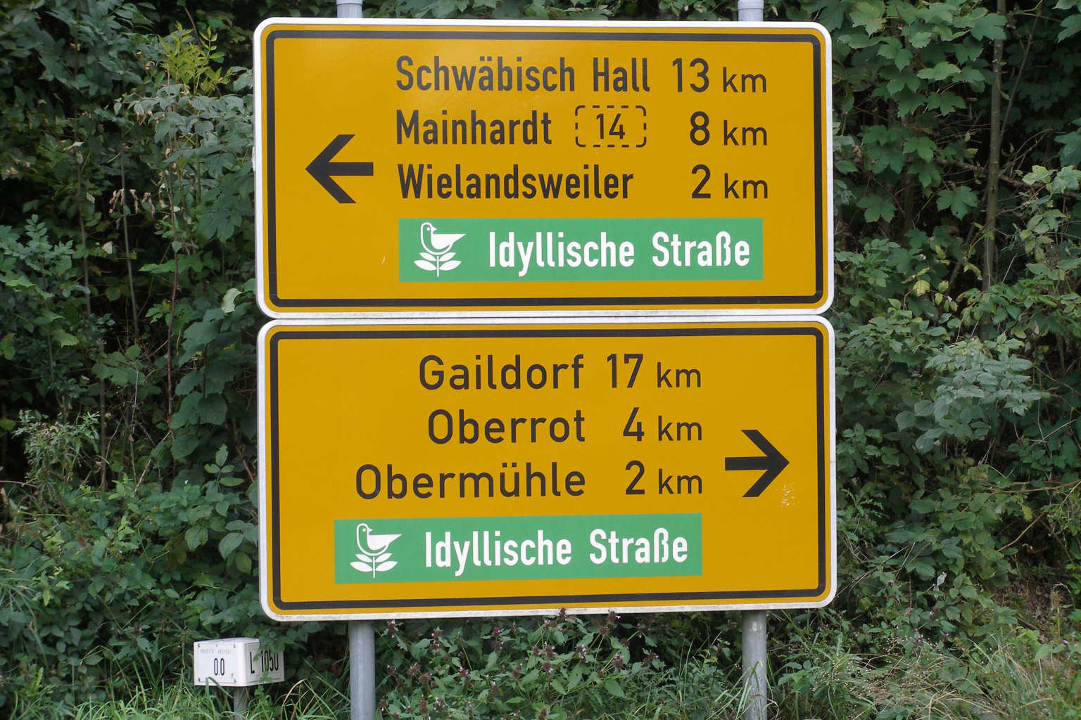 Straßenschild an der Idyllischen Straße bzw. der L 1050